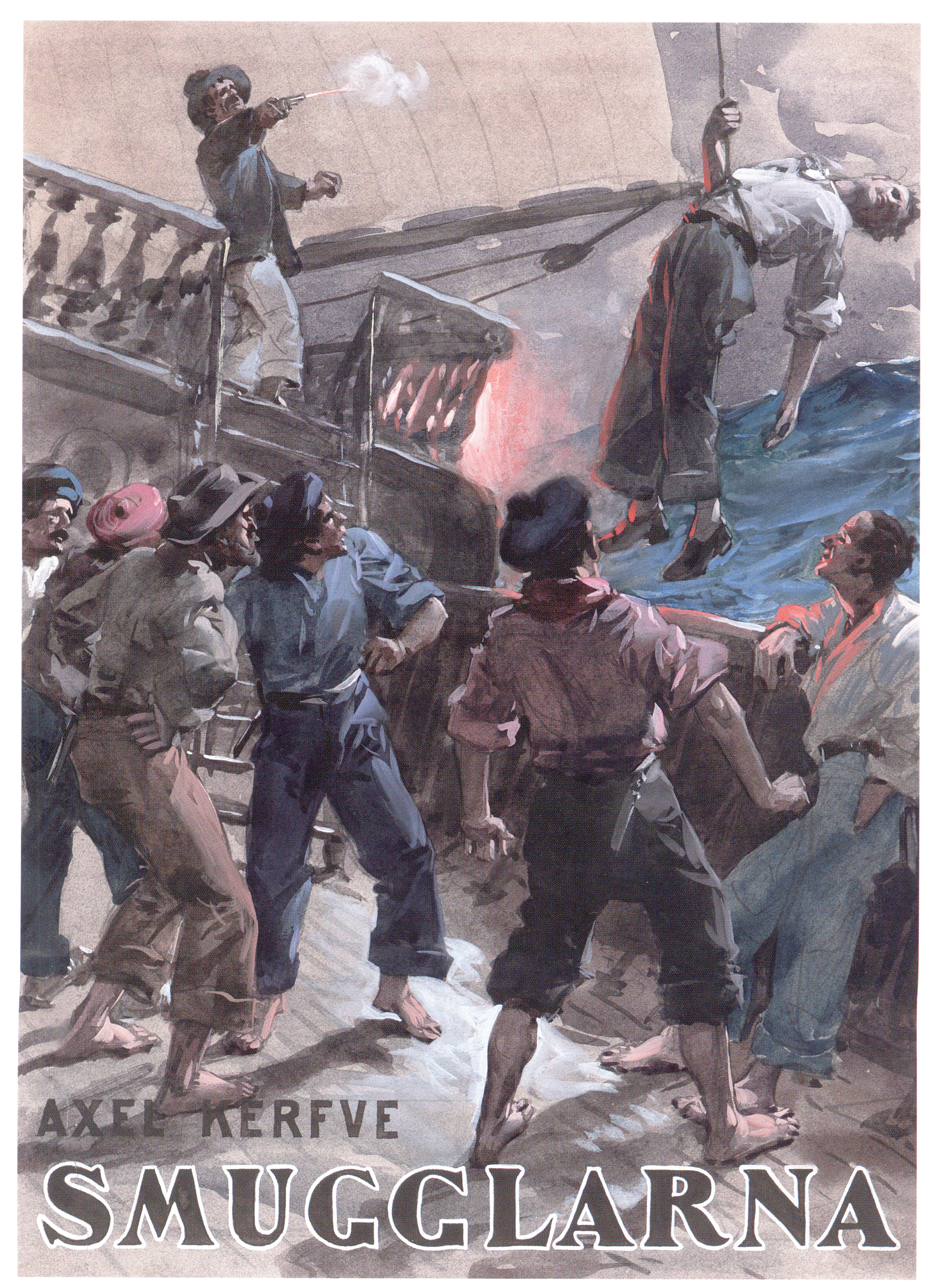 Bokomslag till Kerfve - Smugglarna Artist: David Ljungdahl (1870-1940)